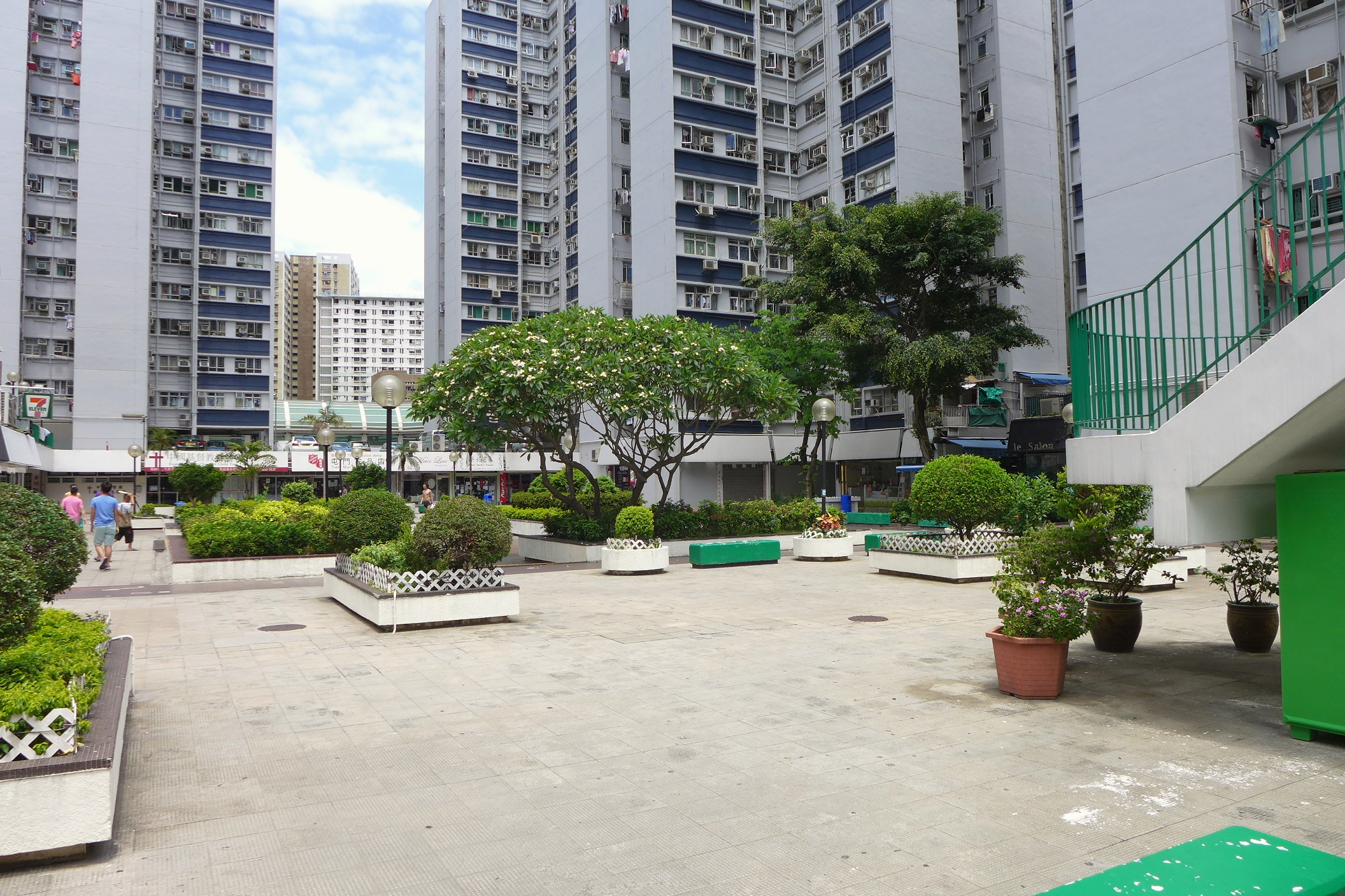 Chi Lok Garden Shops